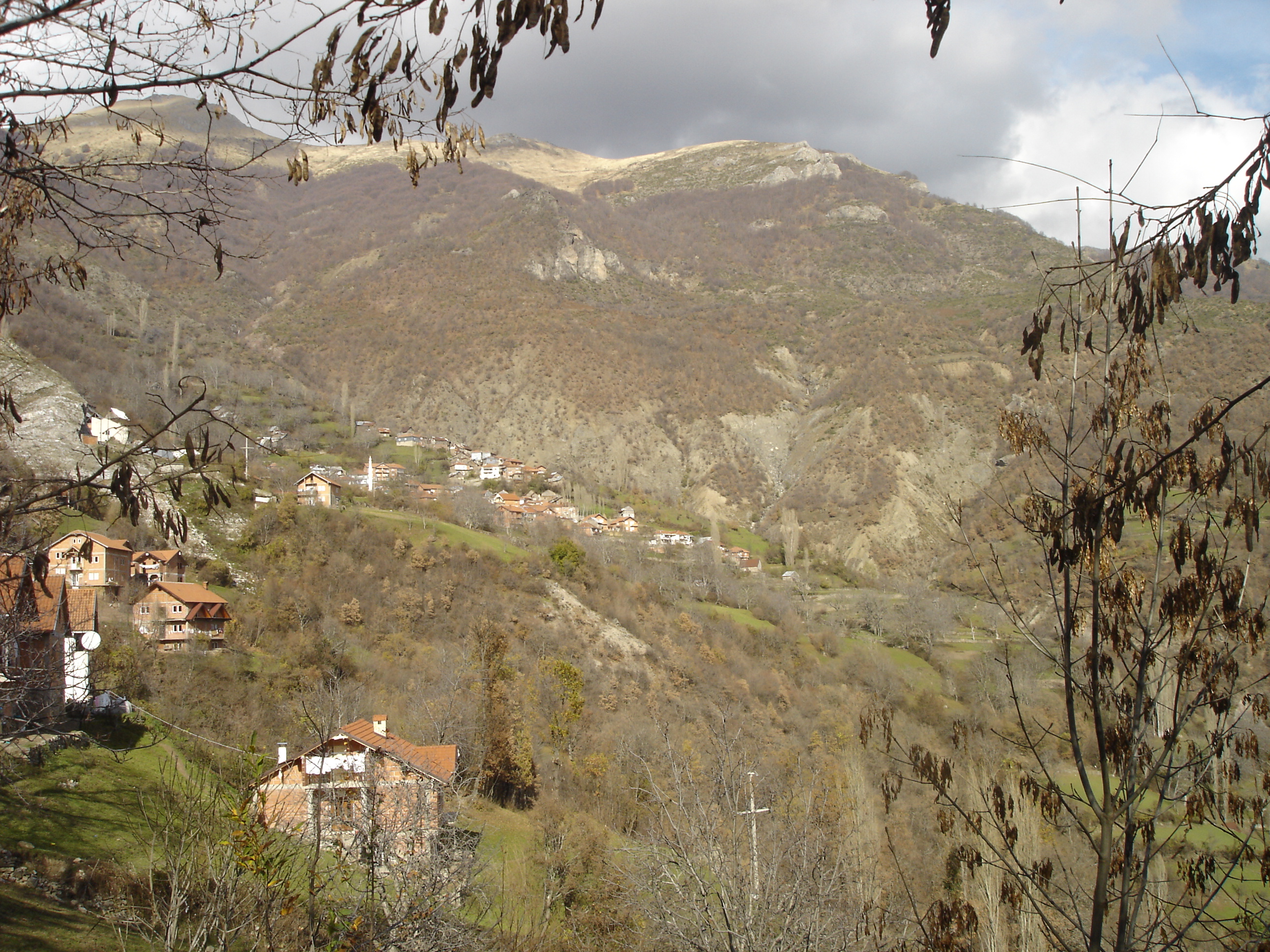 Поглед на Горно Косоврасти и планината Дешат од патот за Долно Косоврасти и Дебар